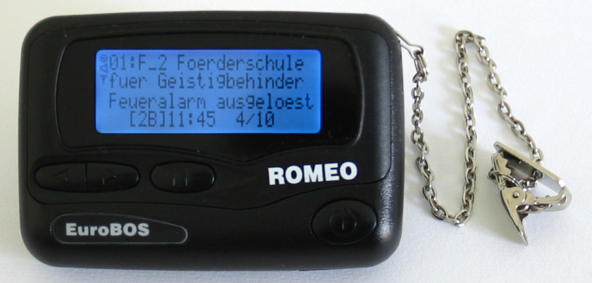 Funkmeldeempfänger Modell AL-A25 der Feuerwehr